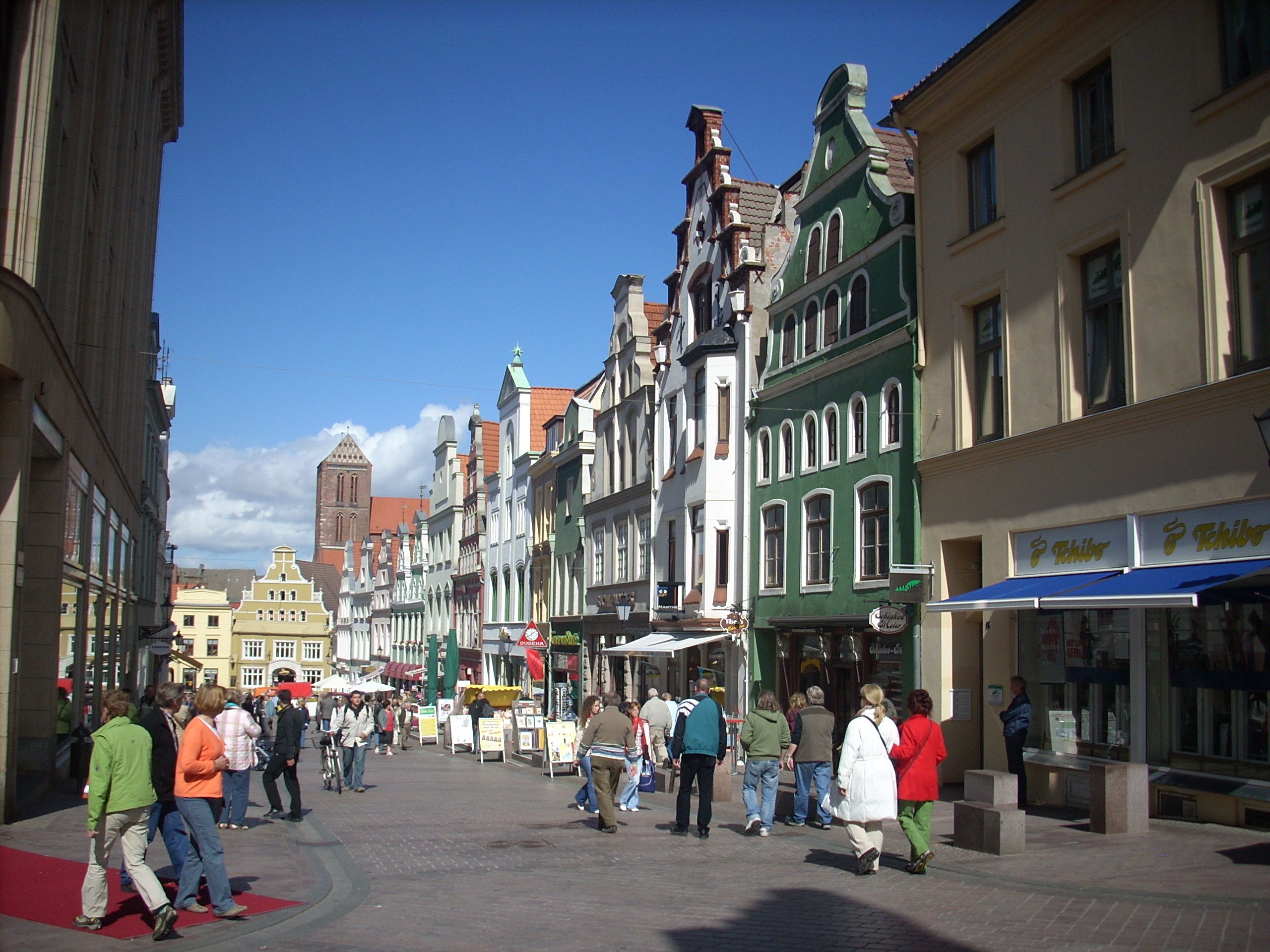 Wismar, Krämerstraße, im Hintergrund Turm St. Nikolai